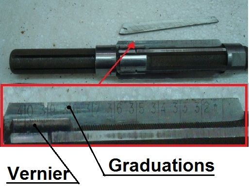 Alésoir expansible, détail d'une lame gradée et vernier de réglage fin.